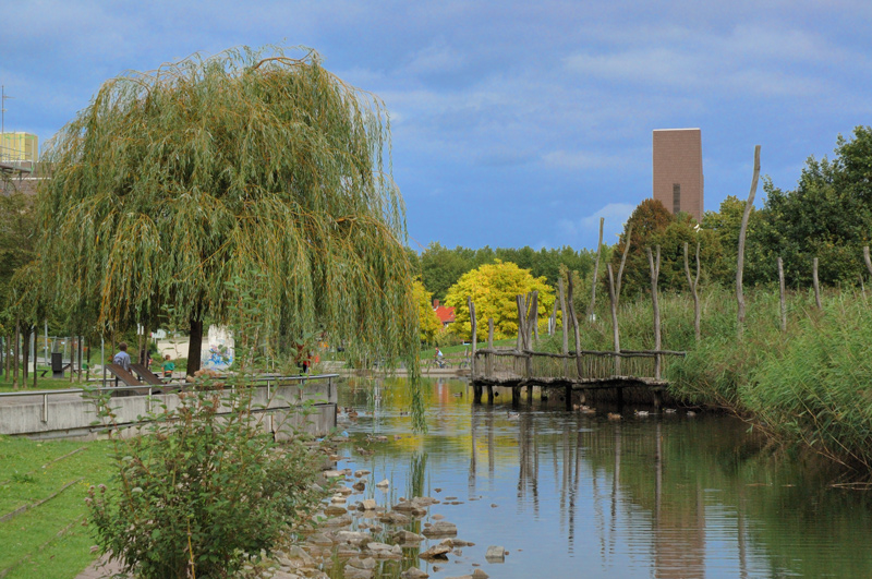 Germany Bergkamen Wasserpark